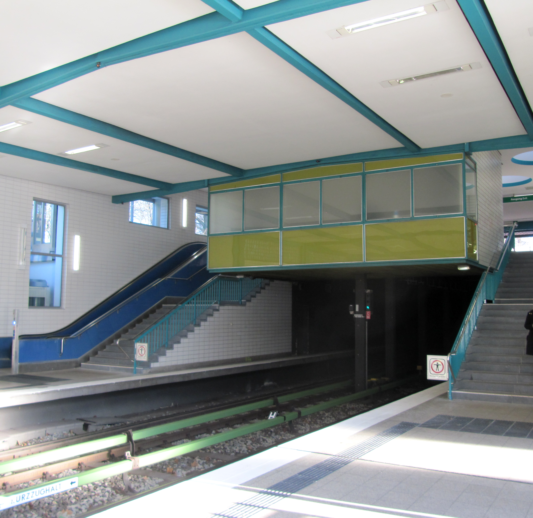 Das Foto zeigt die Kanzel, die Ende der 1960er und in den 1970er Jahren zur Abfertigung genutzt wurde. Mitte der 1980er Jahre wurde das Bahnhofspersonal abgezogen, seitdem dient die Kanzel als Abstellraum.